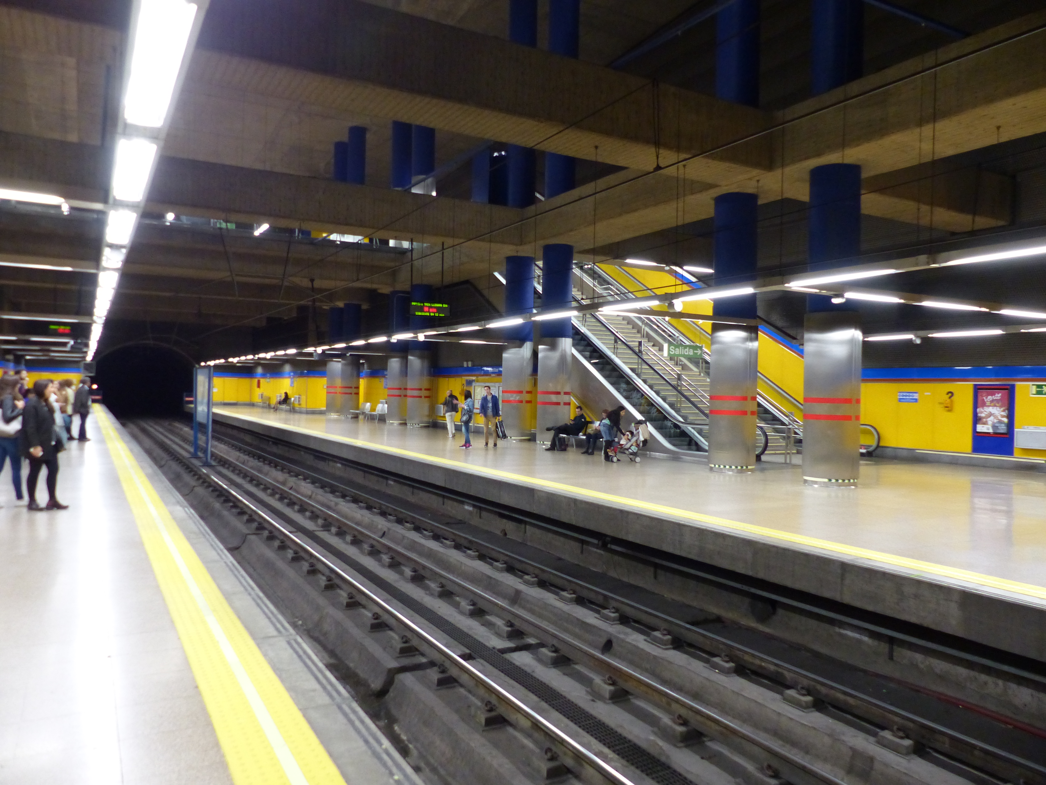 Andén de la estación.